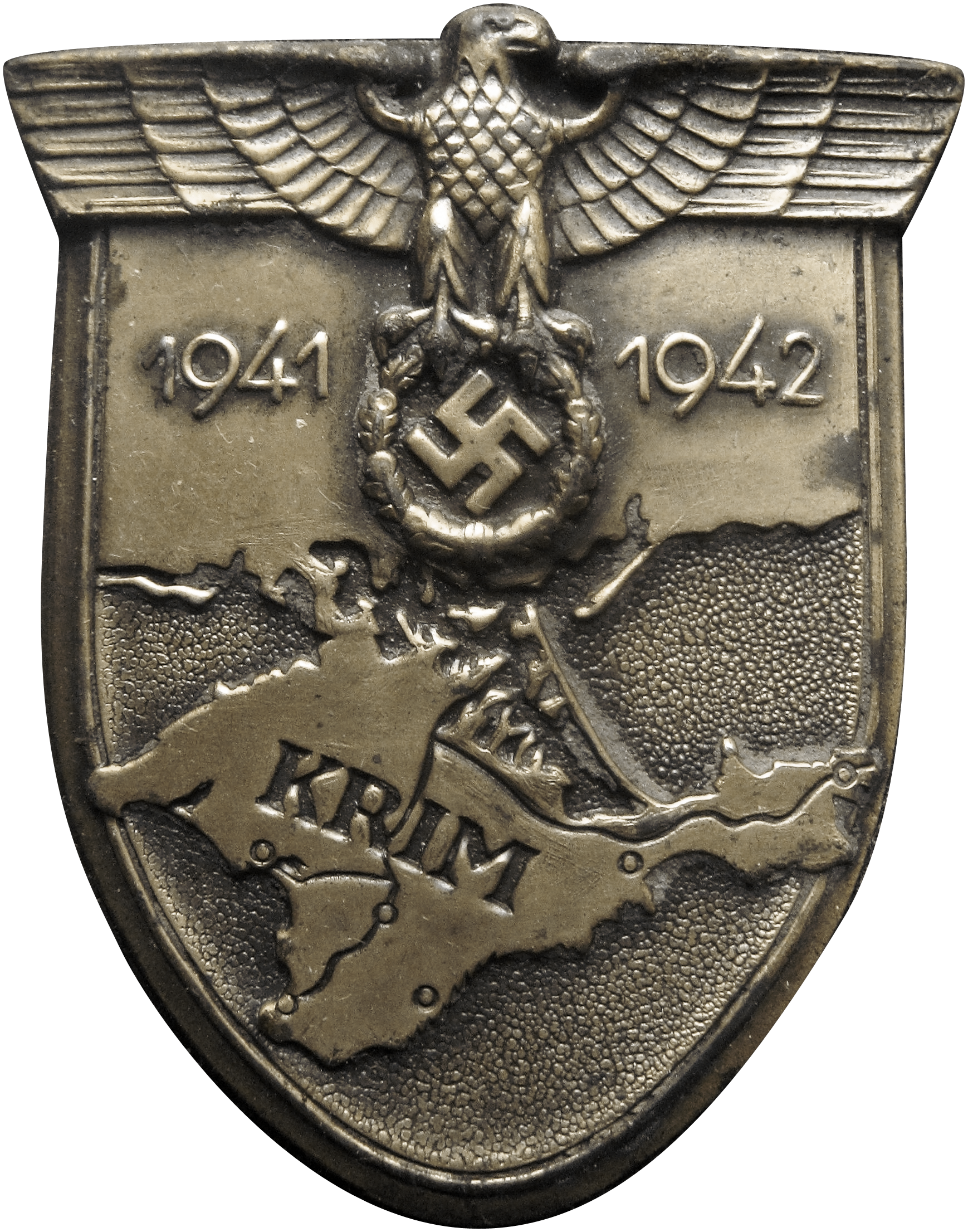 Krimschild